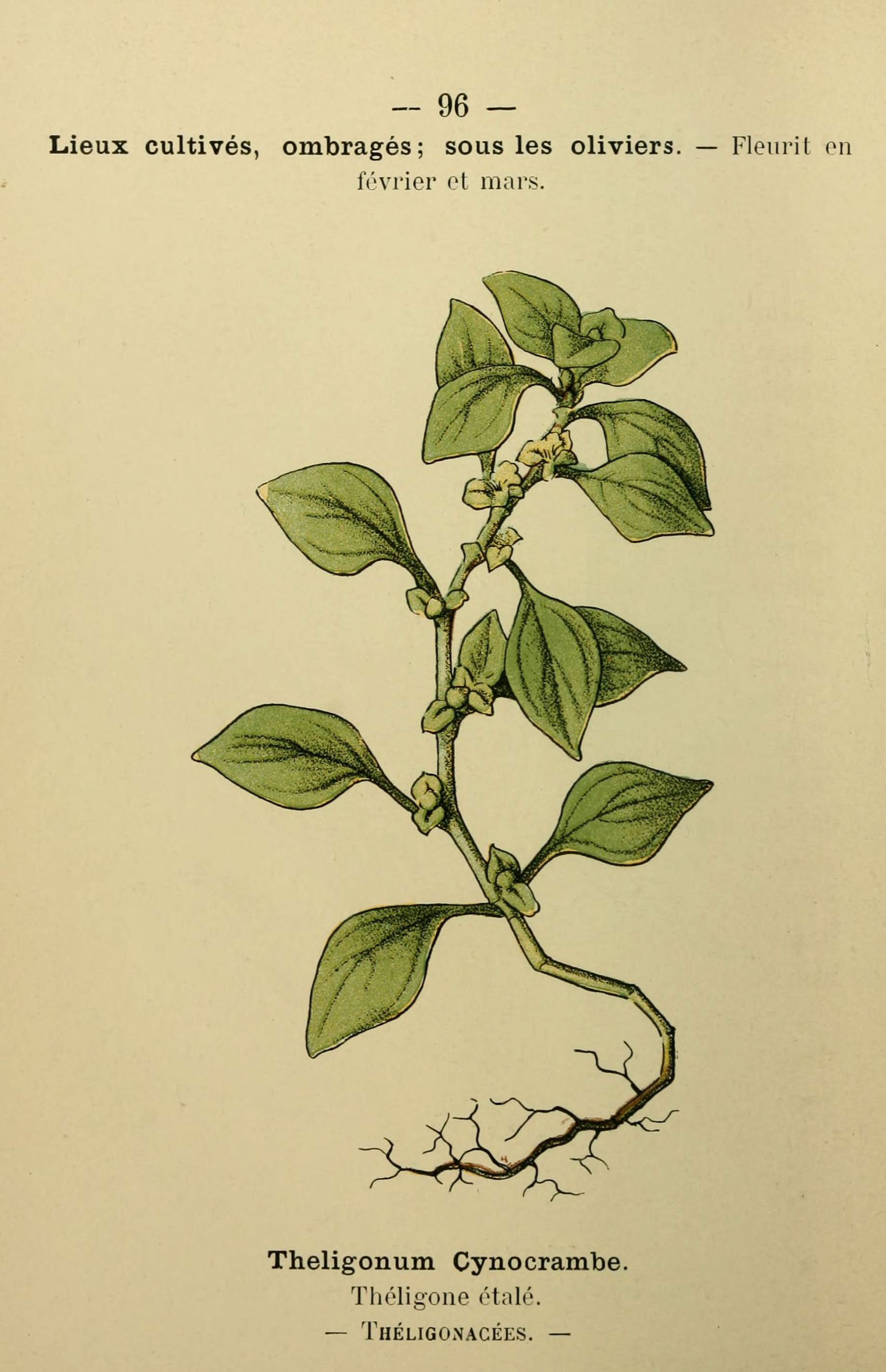 96 — Lieux cultivés, ombragés; sous les oliviers. — Fleurit on février et mars. Theligonum Cynocrambe. Théligone étalé. — Théligonacées. —